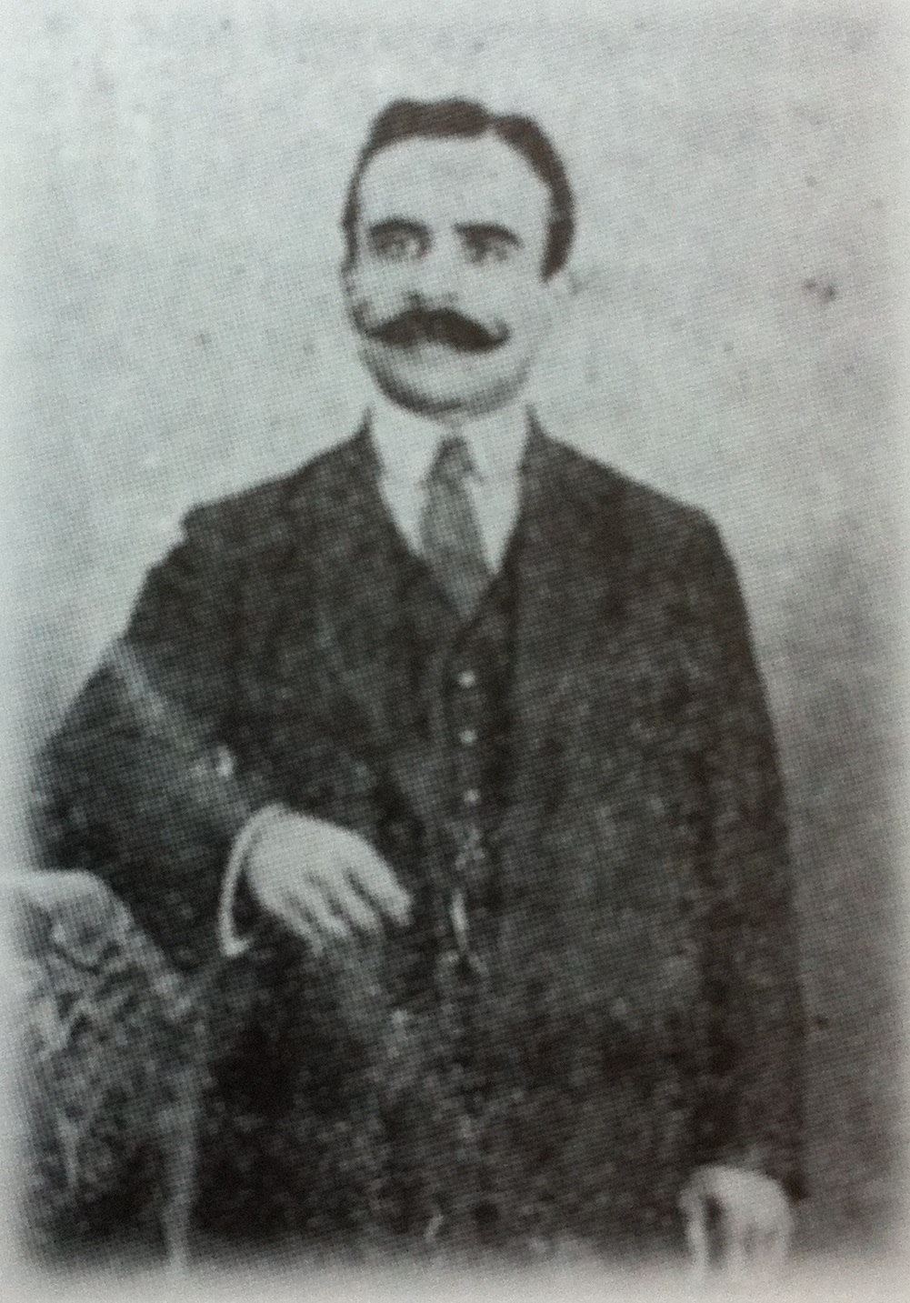 מכלוף נג'אר (1888-1963), מו"ל, סופר ומחזאי יהודי תוניסאי. Makhlouf Nadjar (1888-1963) Jewish-Tunisian publisher, writer, poet and theatre director.